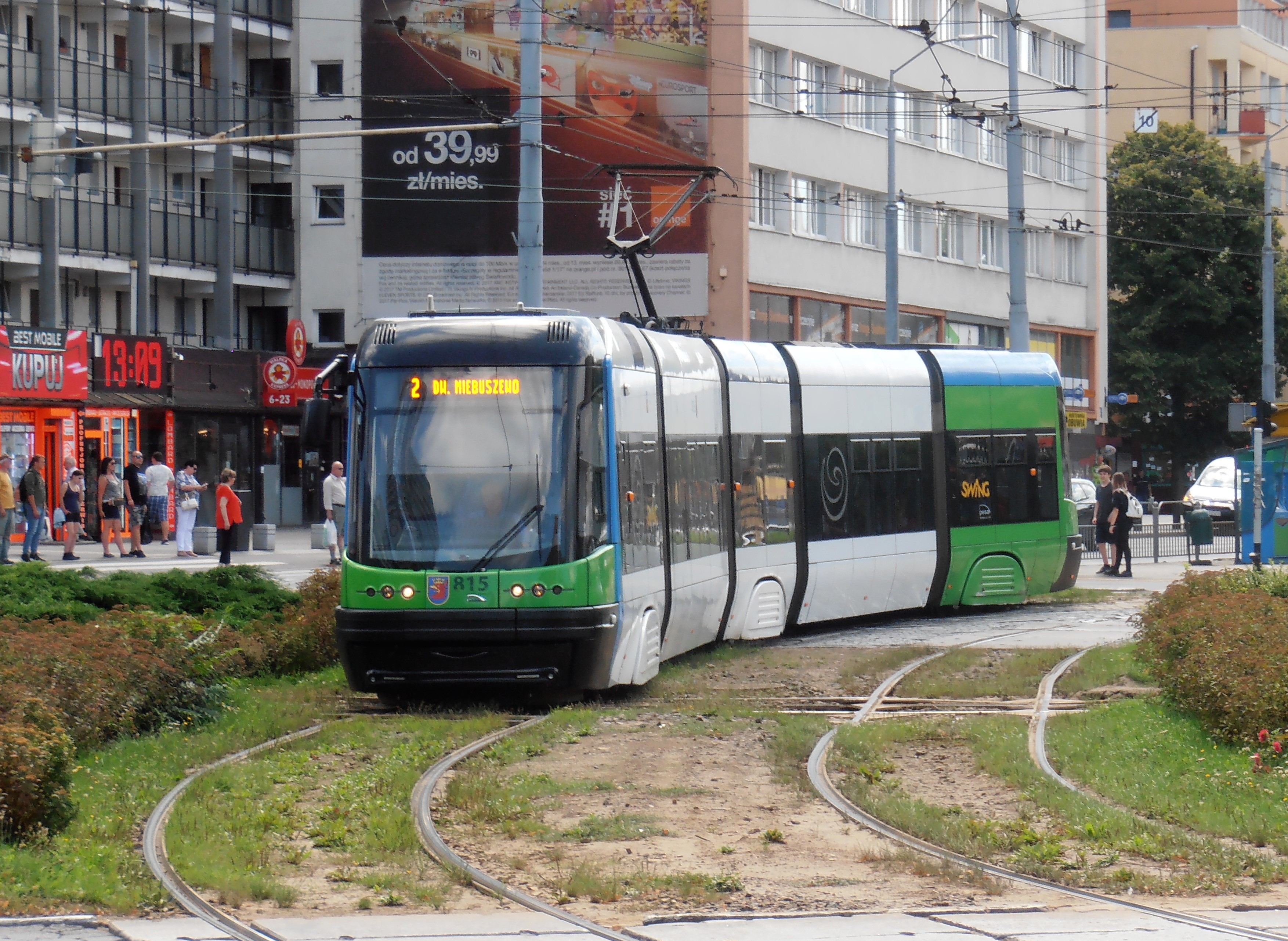 Tramwaj typu Pesa 120NaS2 w Szczecinie na pl. Rodła, 2018